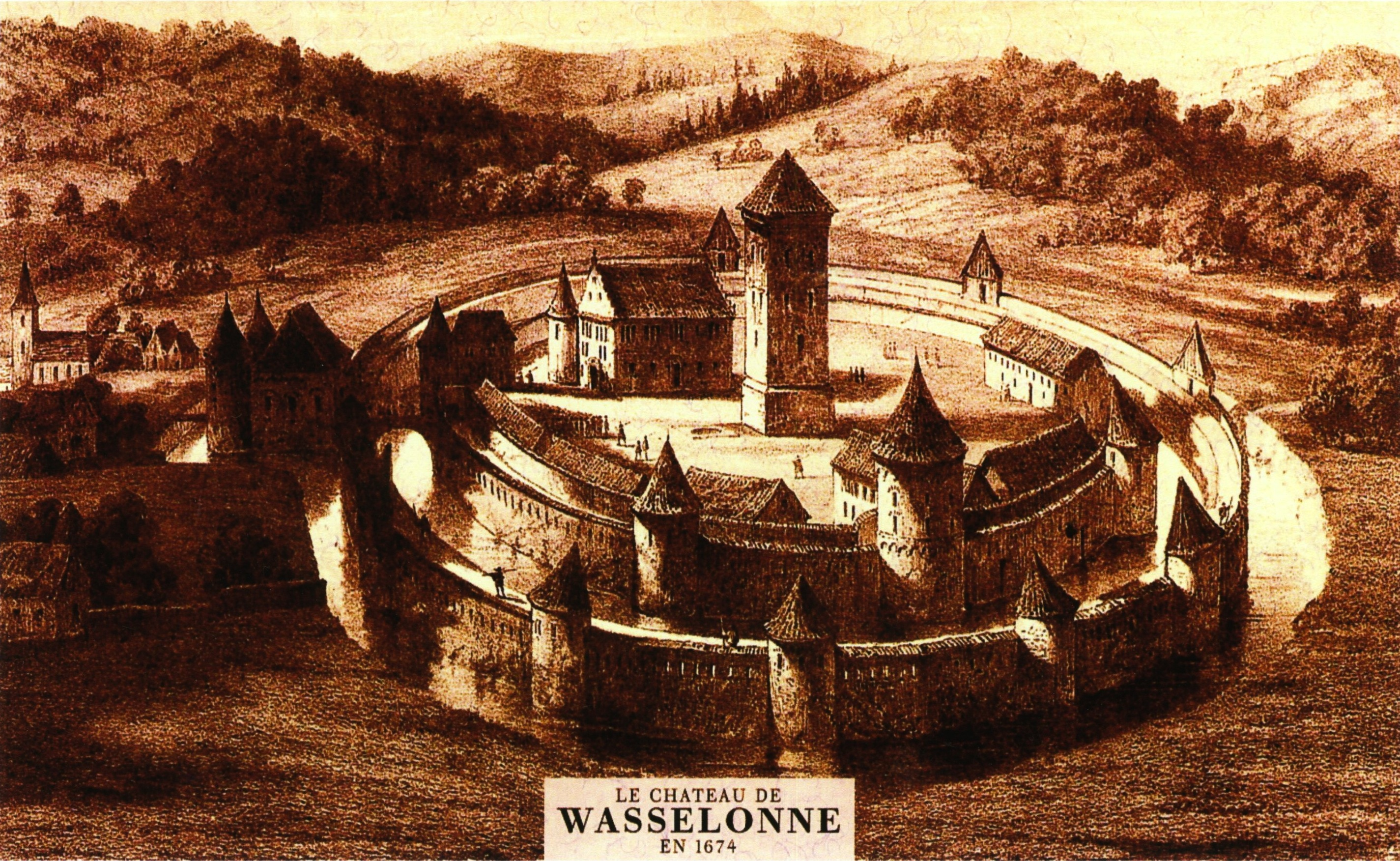 Le château de Wasselonne en 1674. Lithographie du XIXeme siècle.